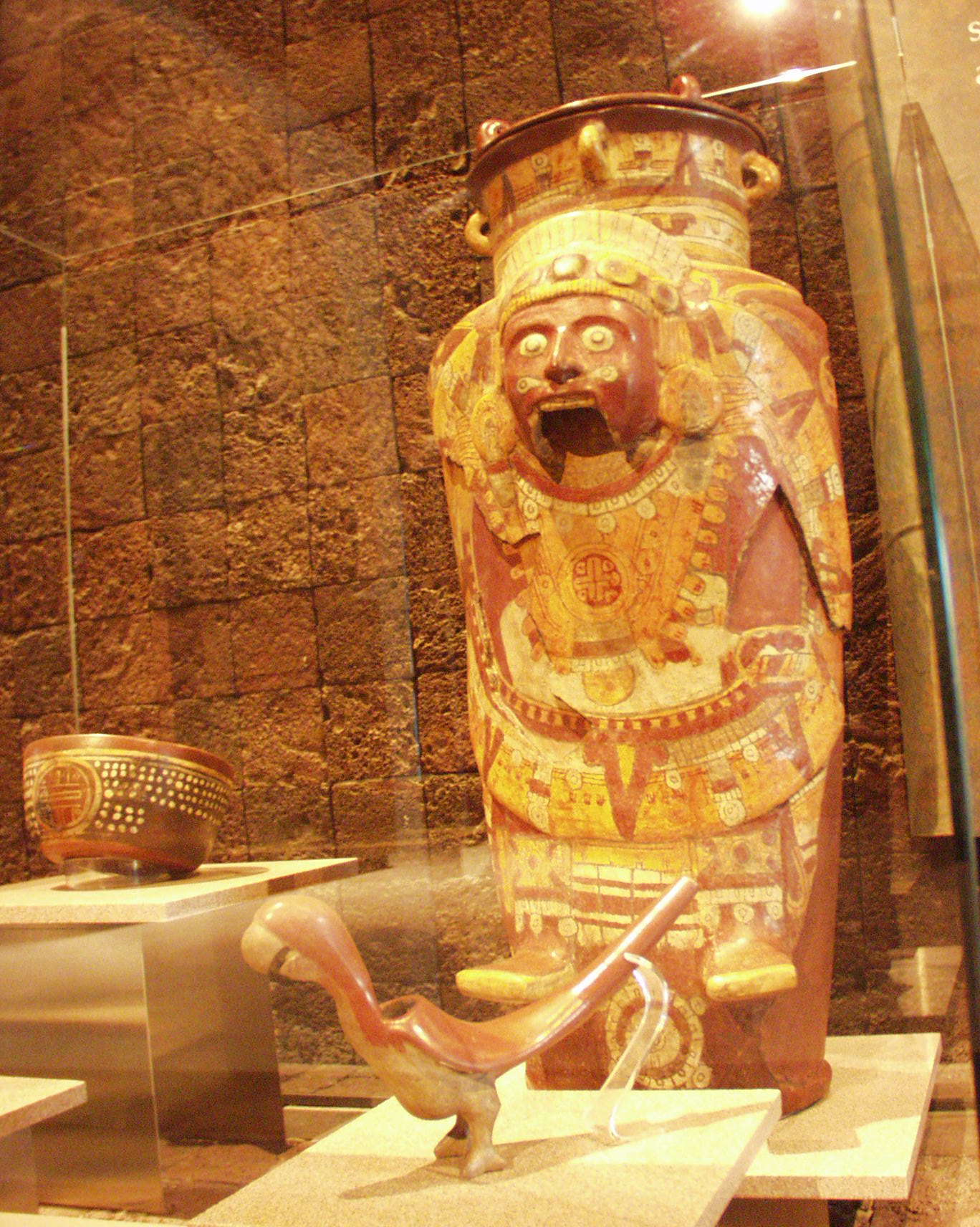 Museo Nacional de Antropologia in Mexico City